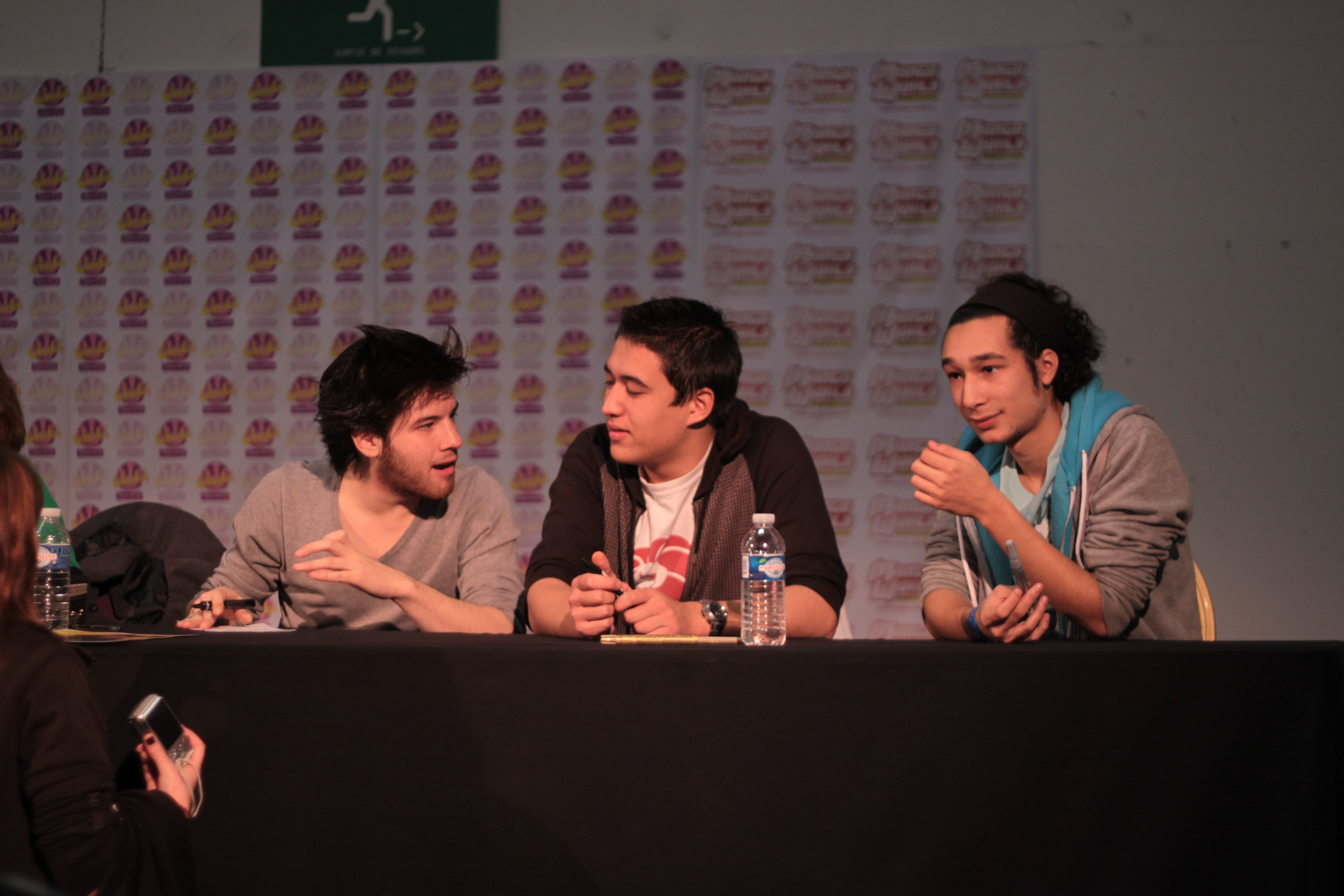 Raphaël Descraques, Luy Menager et Théo Noël, acteurs de la série Le Visiteur du futur à une dédicace. Chibi Japan Expo 2010.